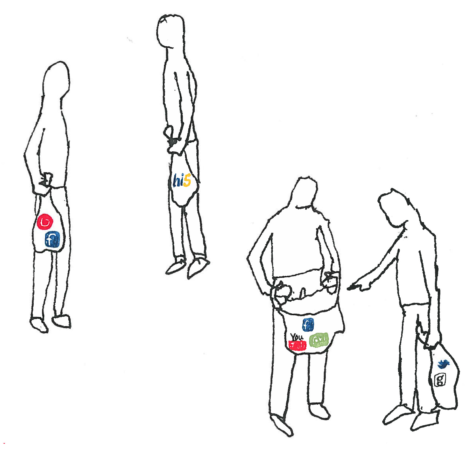 Sosial bokmerking er en aktivtet hvor brukere deler favorittnettsteder